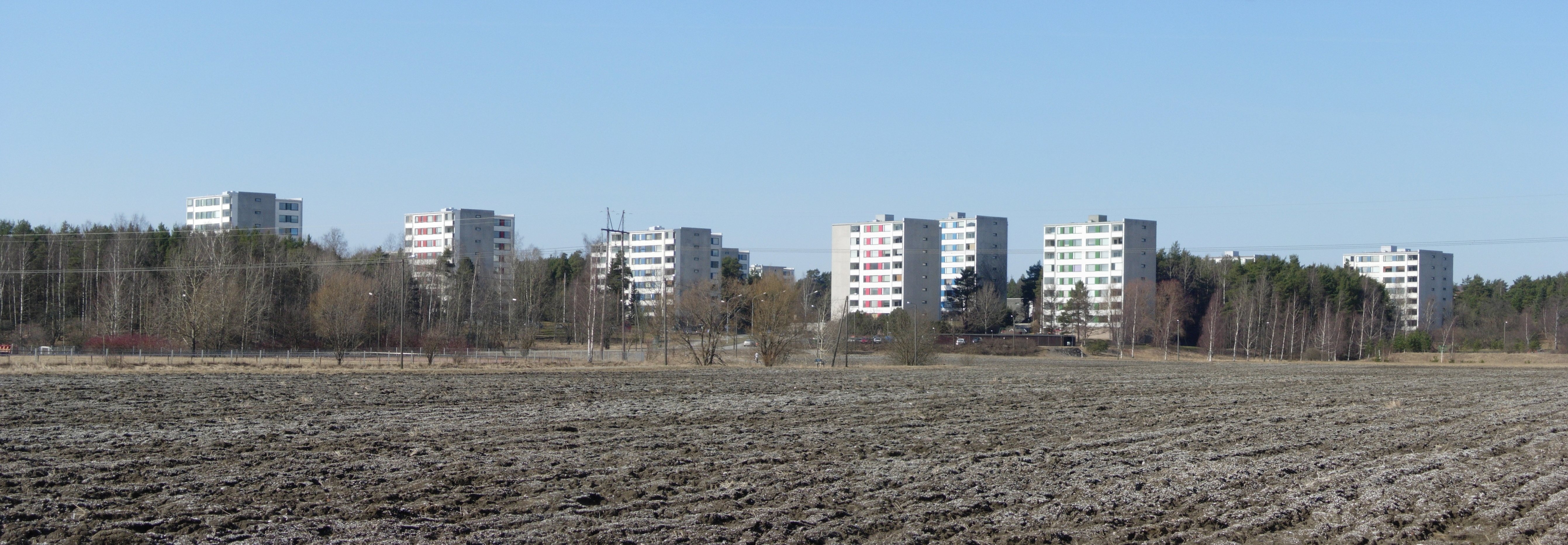 Hepokullan kerrostaloja Tammispaltan puiston yli nähtynä, Vätti, Turku.